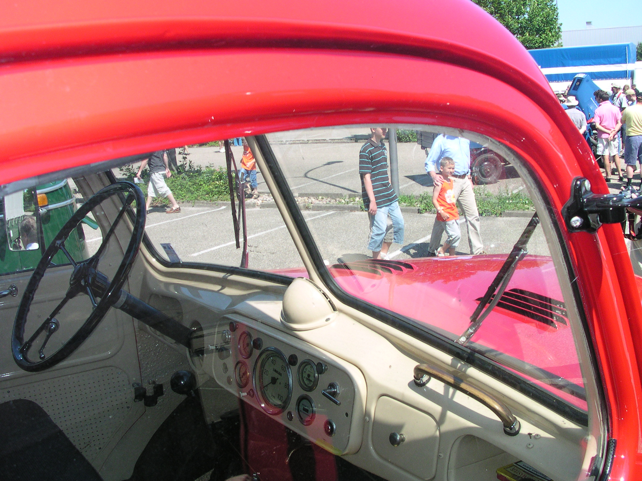 Oldtimer-Treffen bei Daimler-Chrysler in Wörth am Rhein. Magirus Rundhauber Armaturen